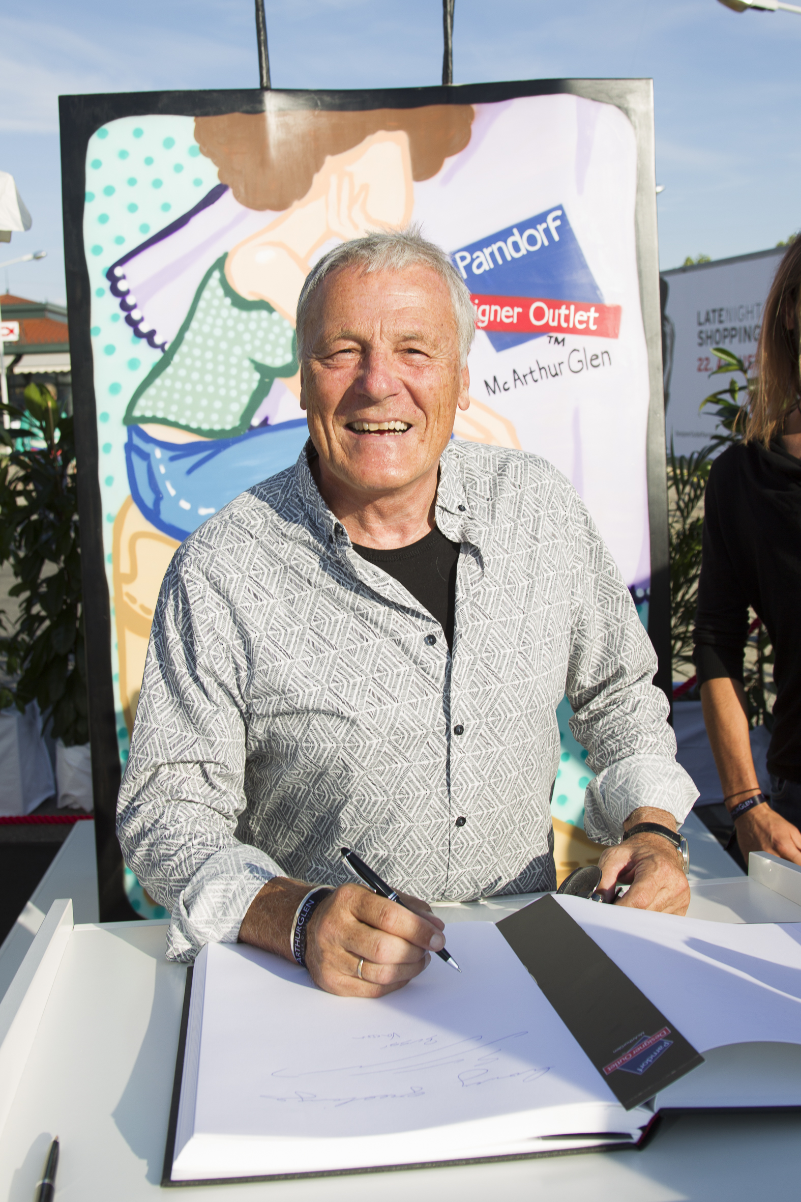 ZIB-Ikone Hans-Georg Heinke beim Eintrag ins Gästebuch des McArthurGlen Designer Outlet Parndorf Fotocredit: McArthurGlen Designer Outlet Parndorf - Presseabdruck honorarfrei